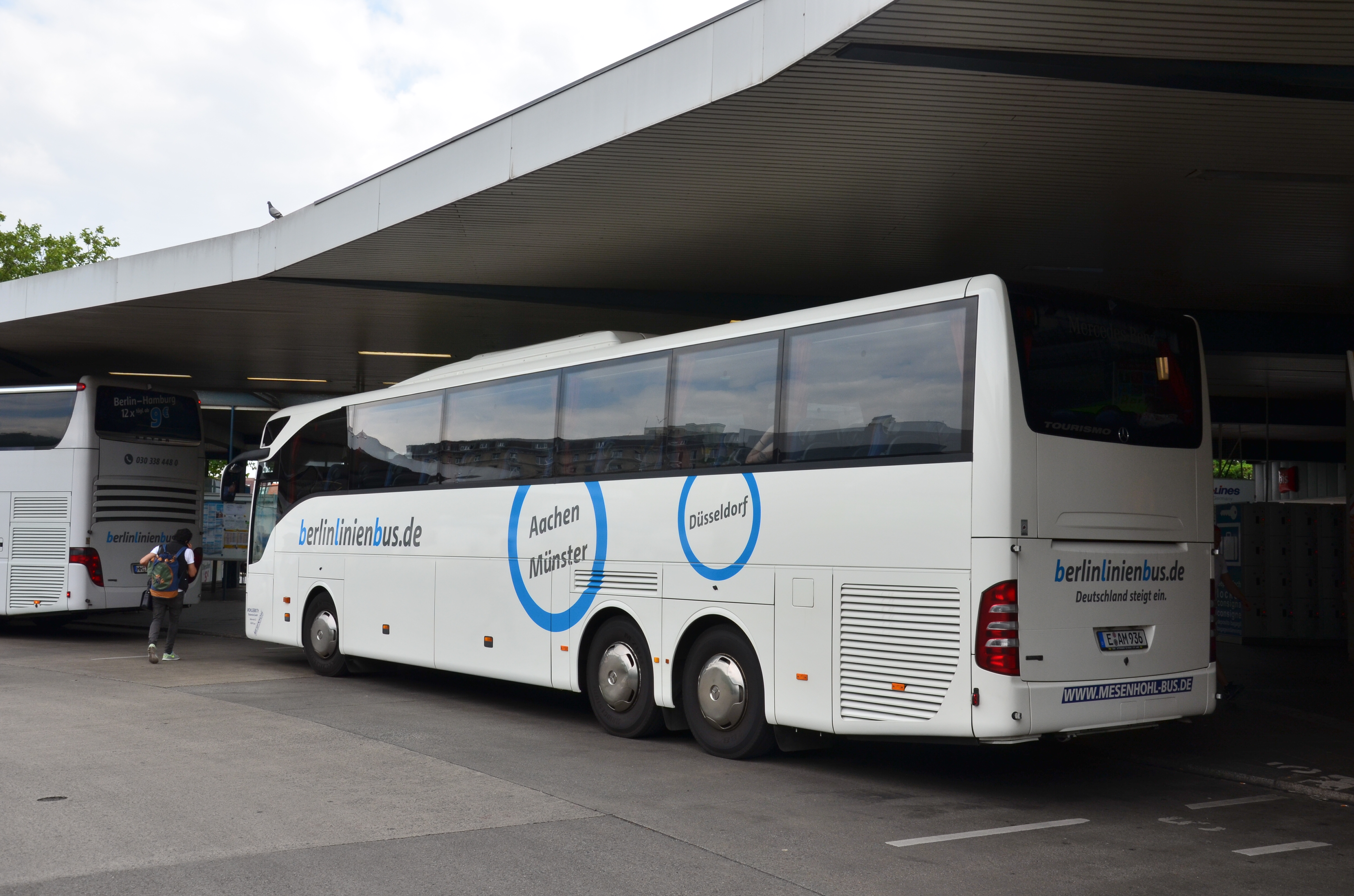 Berlin Linien Bus in Berlin Messe.